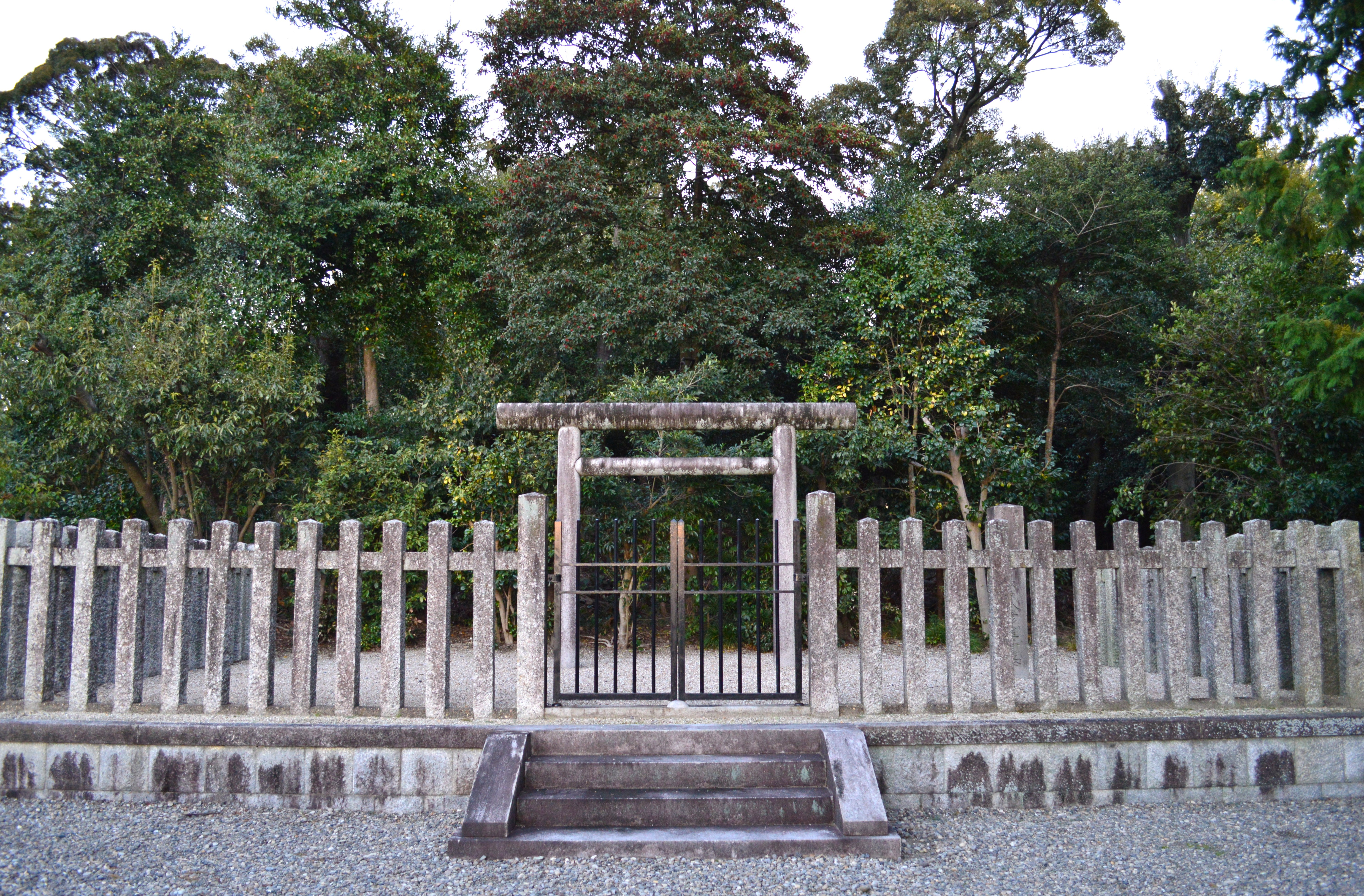 和志山古墳 (五十狭城入彦皇子墓) 拝所